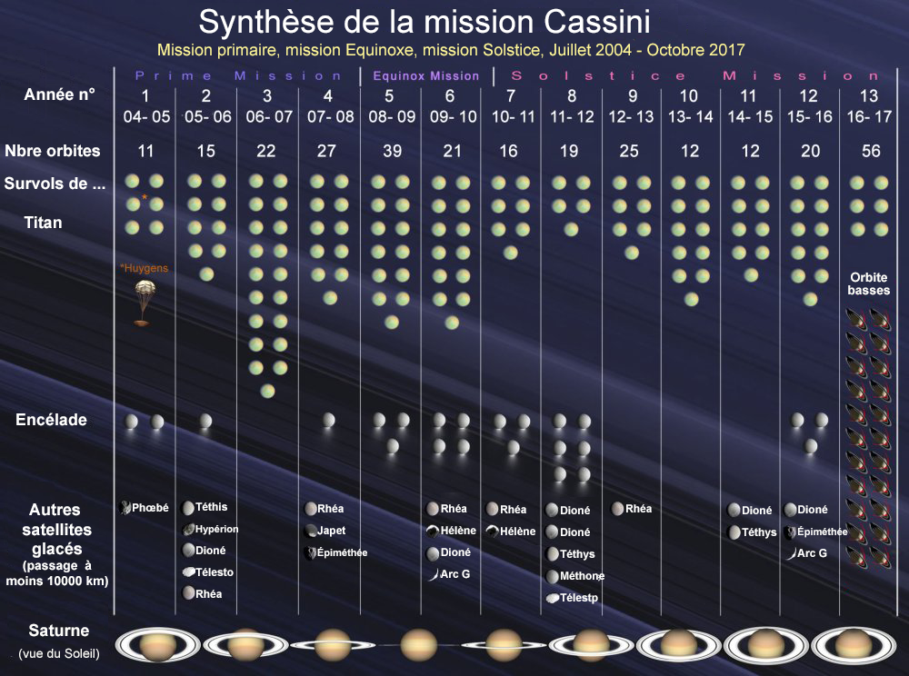 Synthèse de la mission Cassini. Libellés en francais